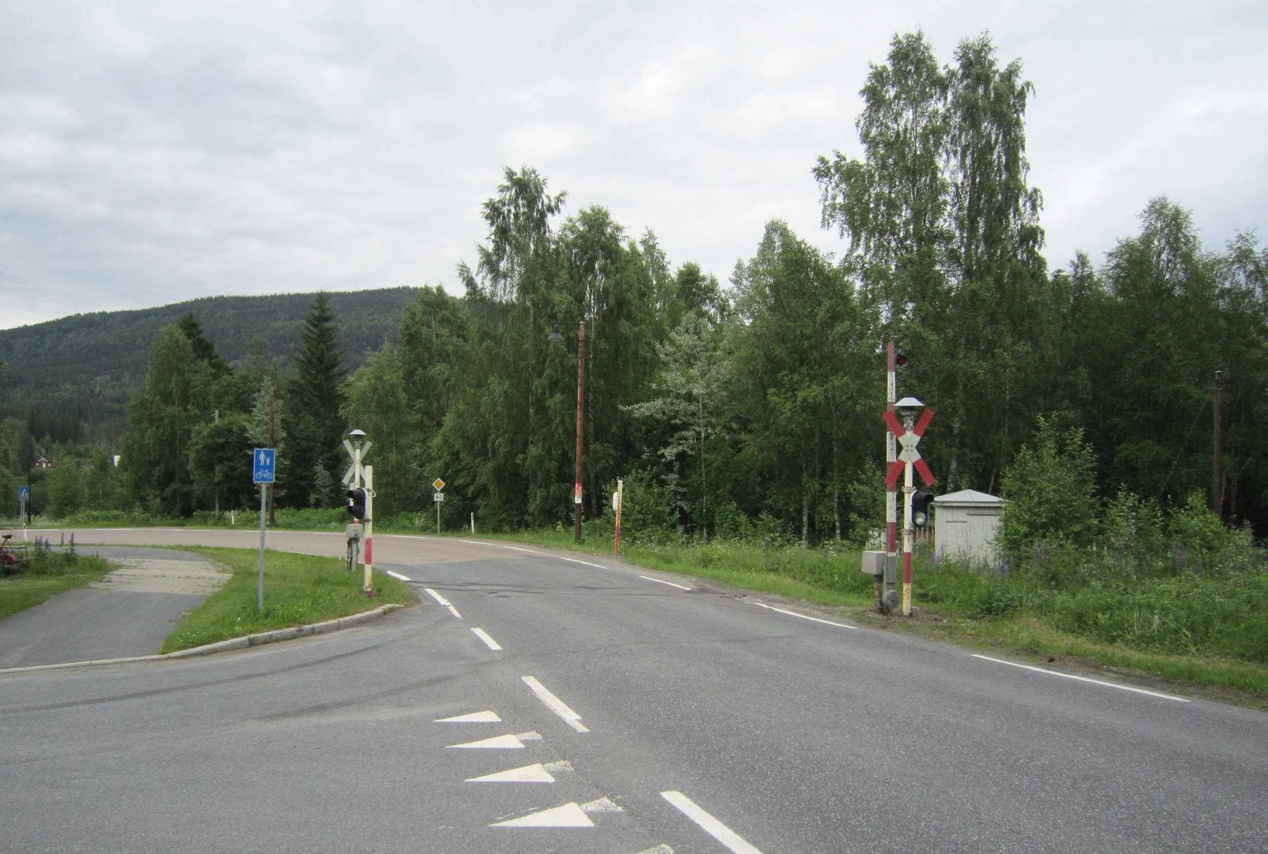 Fylkesvei 40 krysser Numedalsbanen ved Veggli.